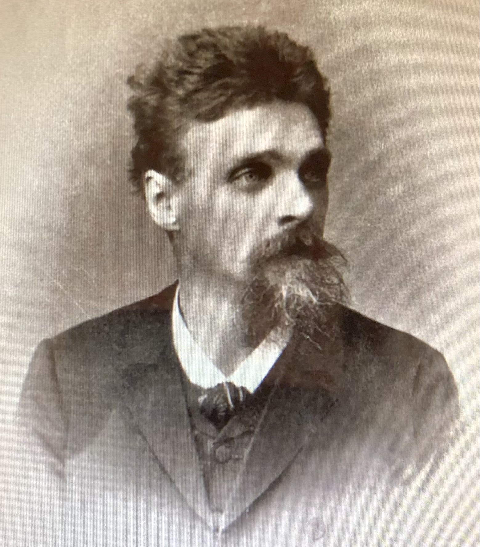 Photo, prise vers 1880, de Johann Burchart (von Bélavary de Sycava) X, dernier membre de la dynastie Burchart qui dirigea la pharmacie de Tallinn de 1582 à 1911.